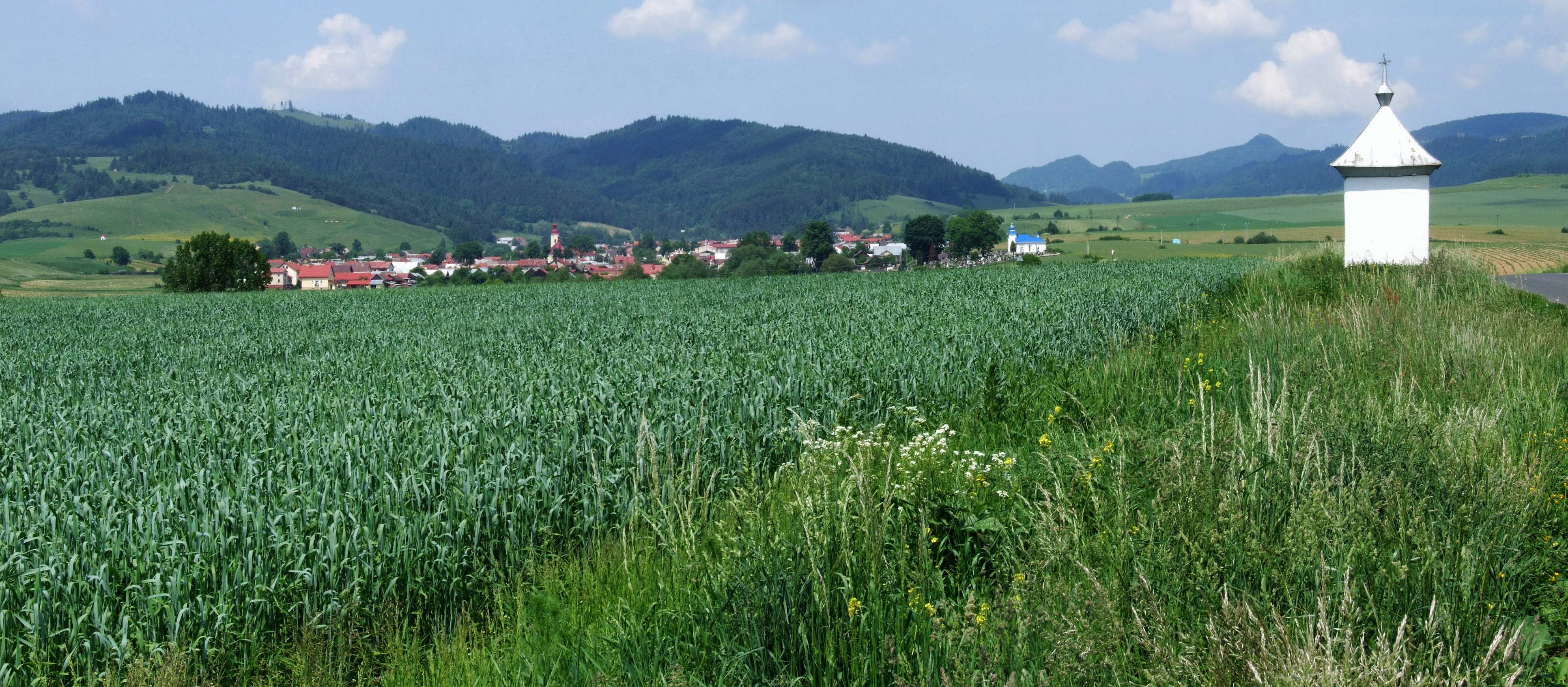 Miejscowość Kamionka (powiat Stara Lubowla). Po prawej stronie Magura spiska, po lewej Pieniny